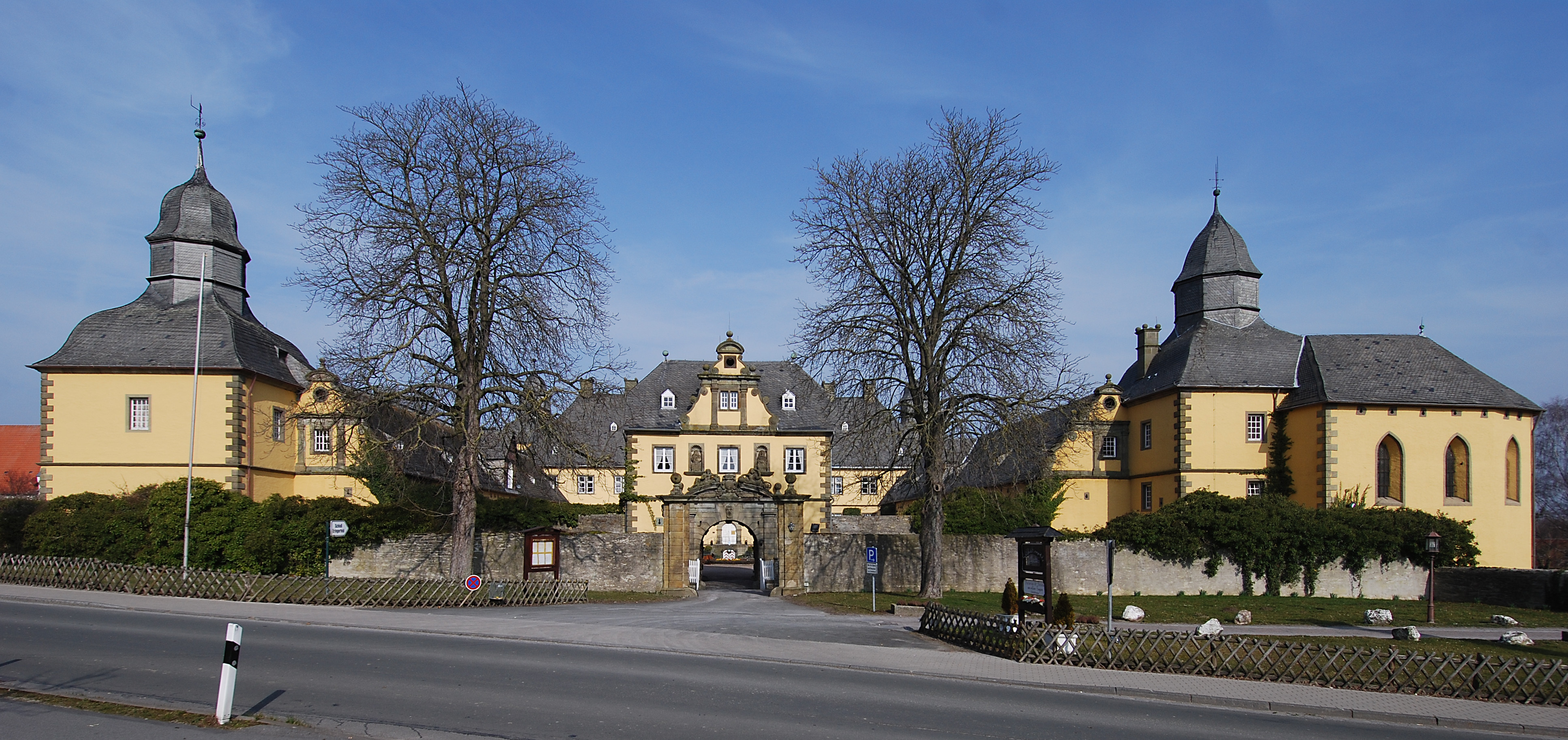 Schloss Eringerfeld an der Steinhauser Straße im Stadtteil Eringerfeld der Stadt Geseke im Kreis Soest in Nordrhein-Westfalen This is a photograph of an architectural monument.